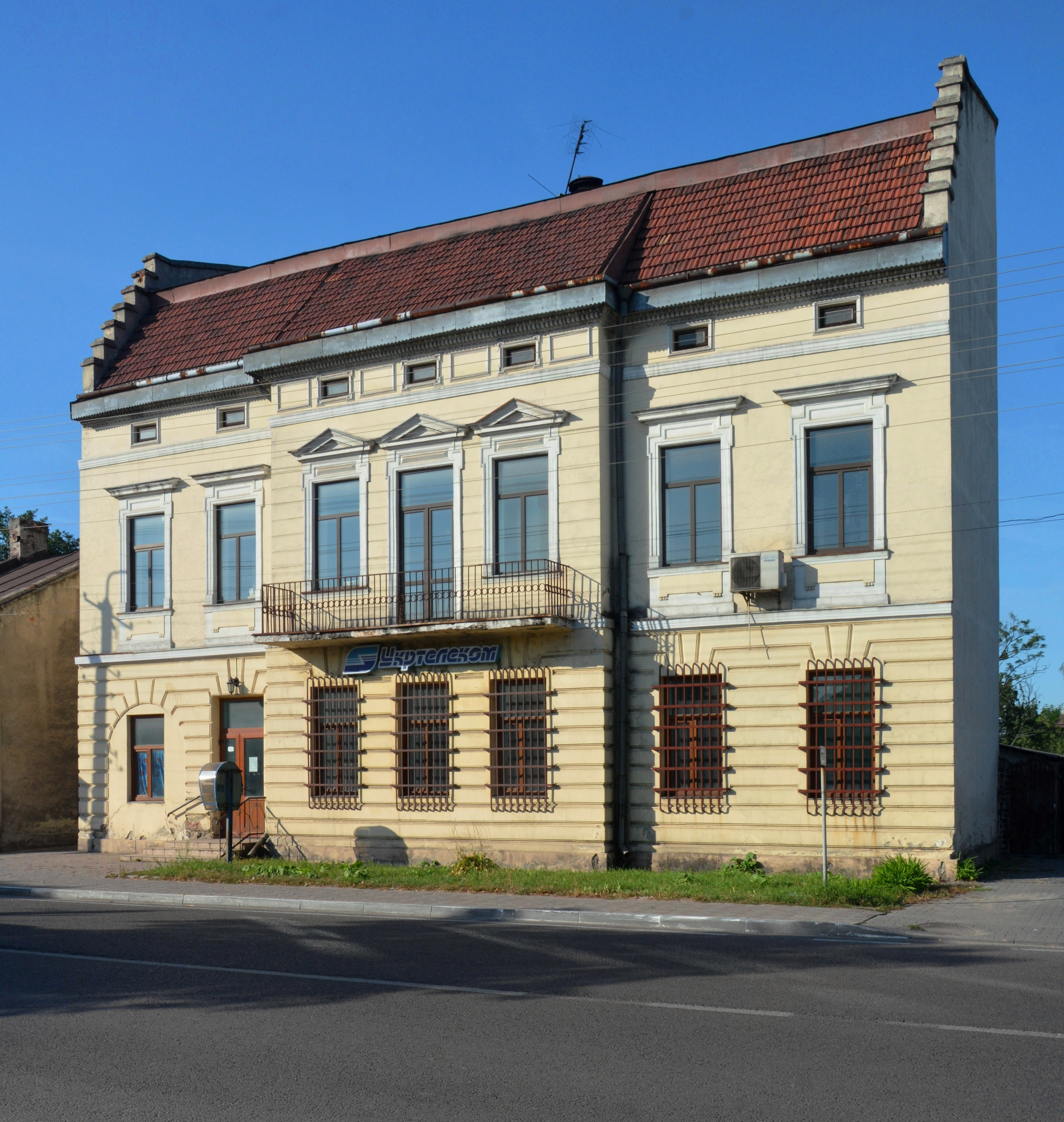 Житлово-торговий будинок, Рава-Руська, вул. Львівська., 15